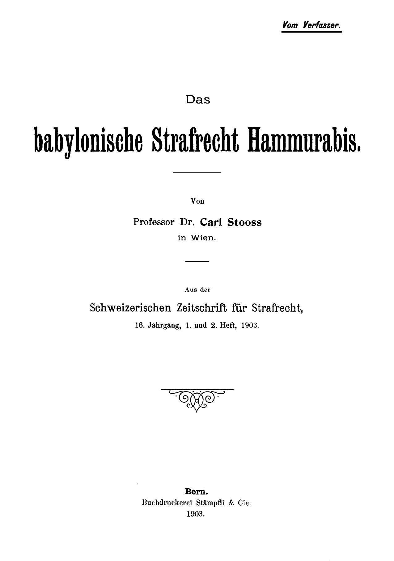 Титульный лист издания «Das babylonische Strafrecht Hammurabis»